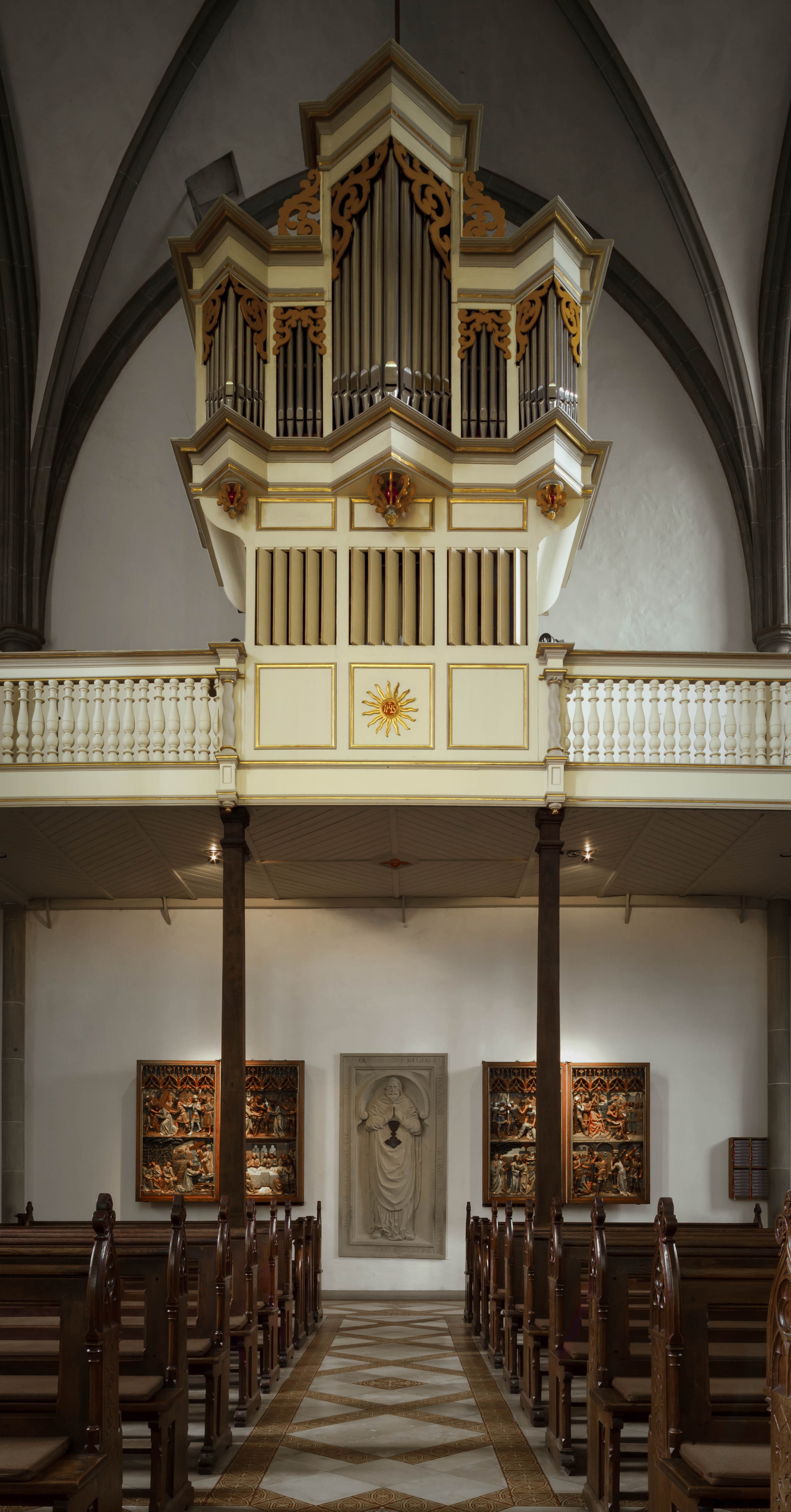 Orgel Kreuzkirche Stromberg